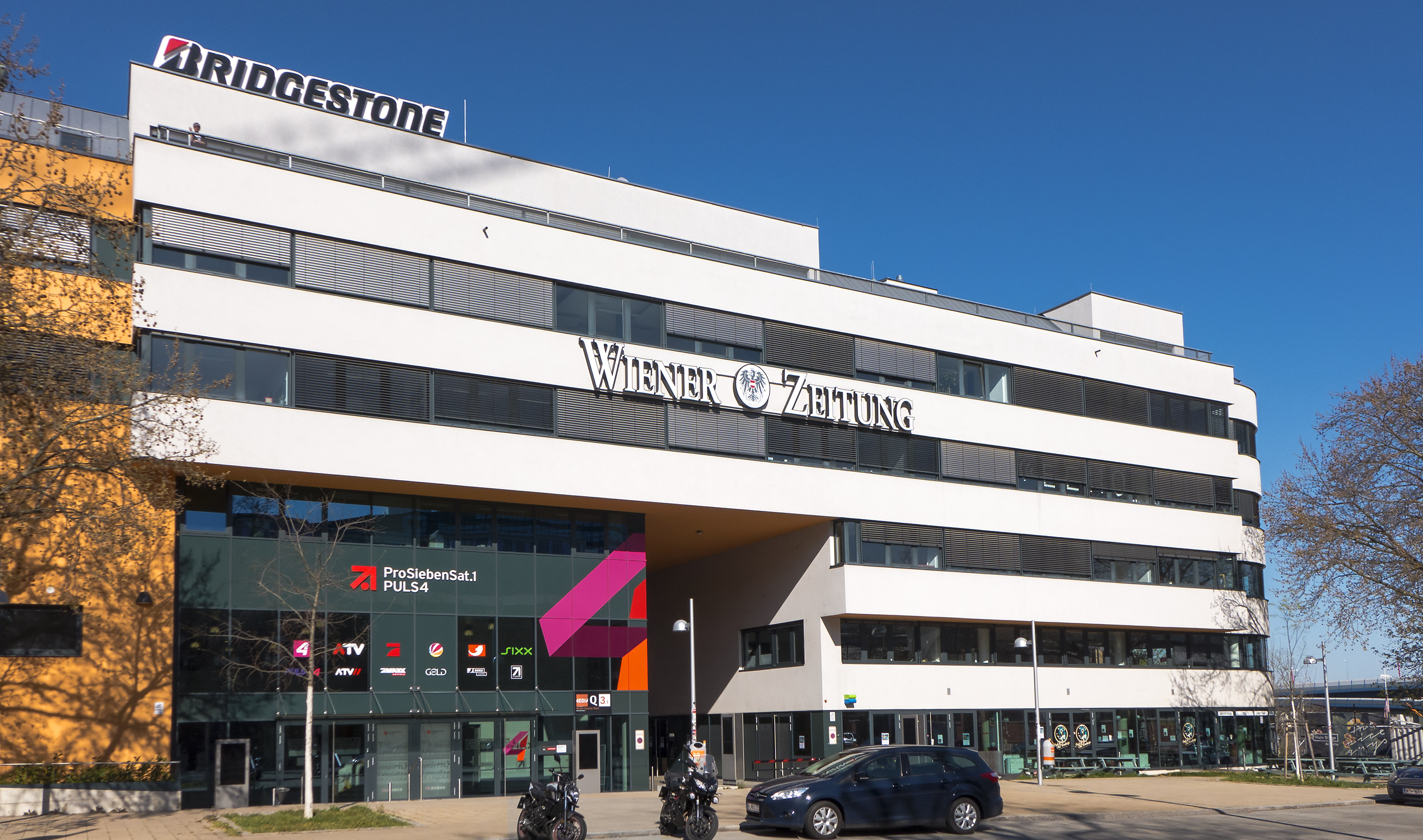 Zentrale der Wiener Zeitung im Media Quarter Marx in Wien 3